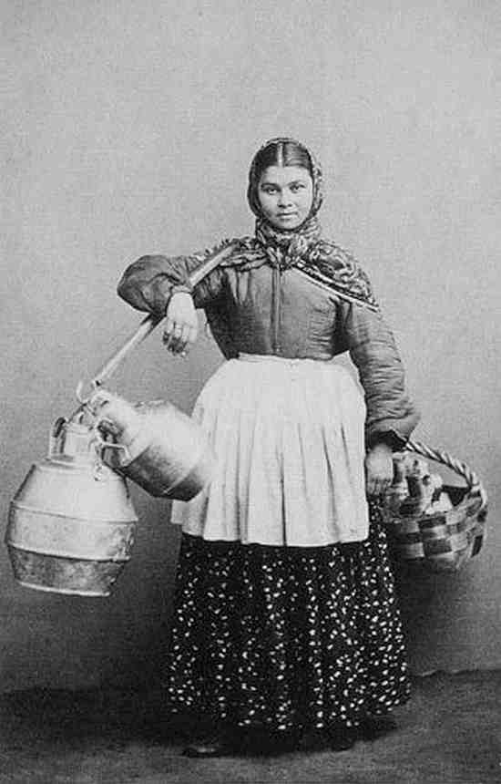 «Охтенка» — ингерманландская финка, продающая молоко в Санкт-Петербурге.